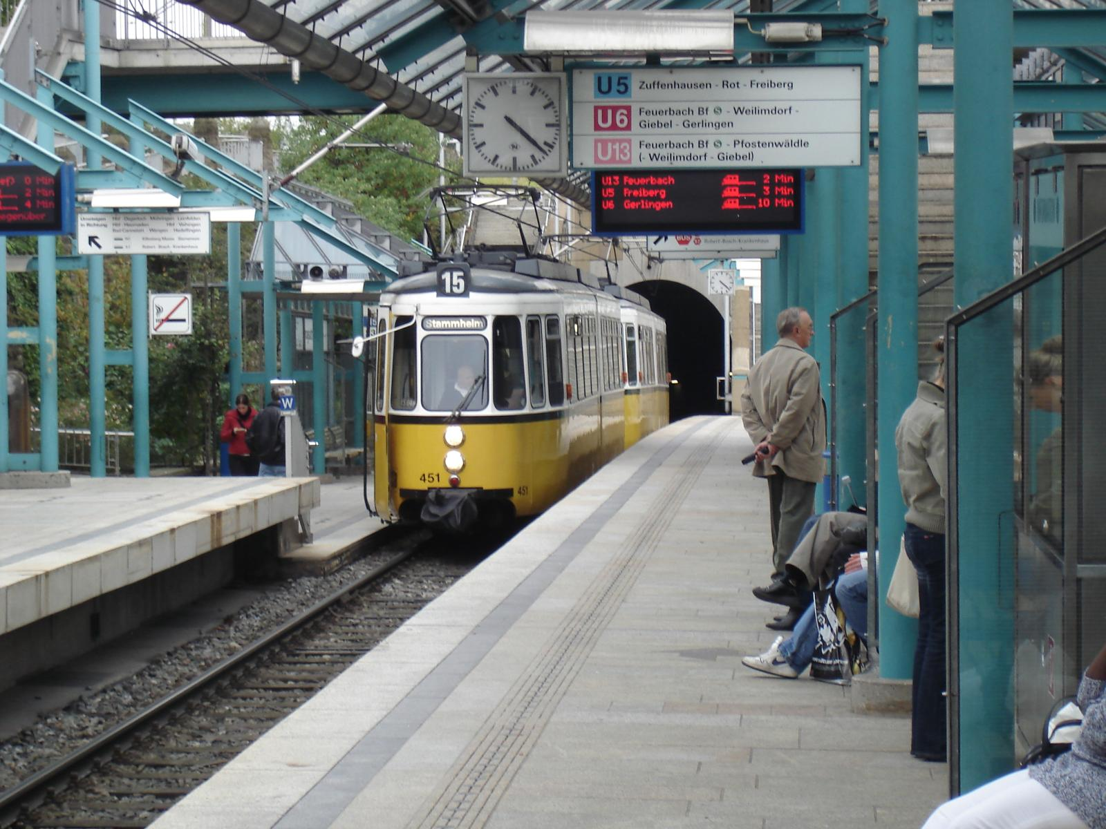 451 nach Stammheim an der Haltestelle "Pragsattel"